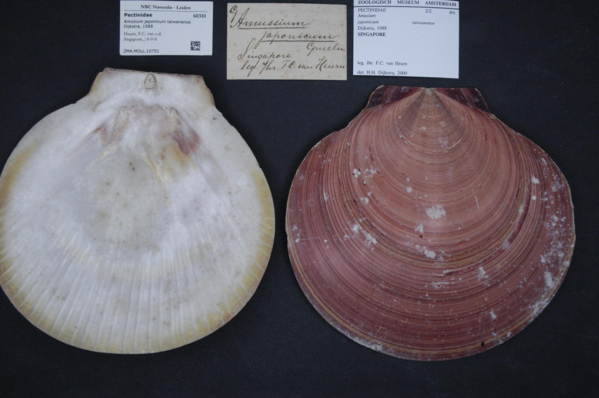 Amusium japonicum taiwanense Dijkstra, 1988